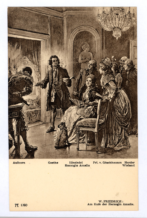 W[oldemar] Friedrich: Am Hofe der Herzogin Amalie. Alte Postkarte aus der Serie 108: Goethe's Leben (12 Karten), F. A. Ackermann's Kunstverlag, München o.J. Der Illustrator Woldemar Friedrich lebte von 1846 bis 1910.